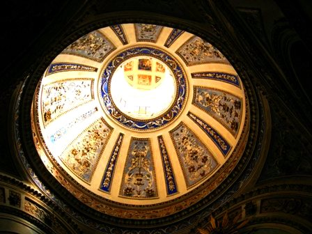 zisa claudio, cupola laterale della chiesa di s maria la nova a scicli, pubblico dominio